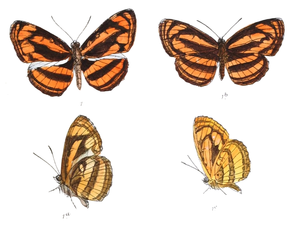 Rahinda aurelia= Pantoporia aurelia